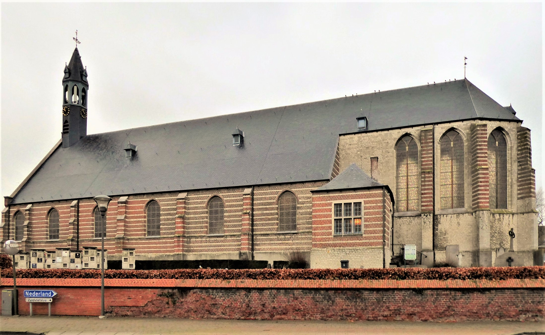 Sint-Gertrudis (Zandvliet)